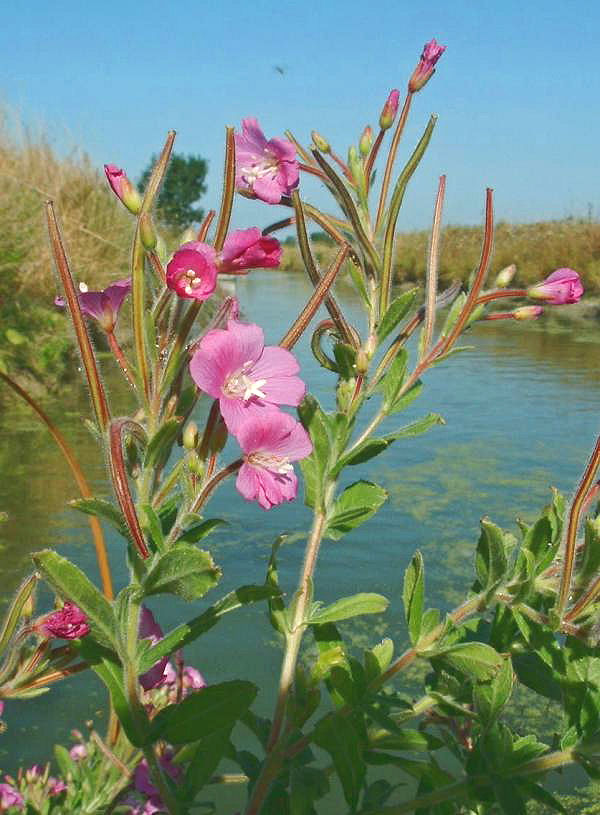 Épilobe hirsute, photo J.F. Gaffard, Talmont-Saint-Hilaire, juillet 2004